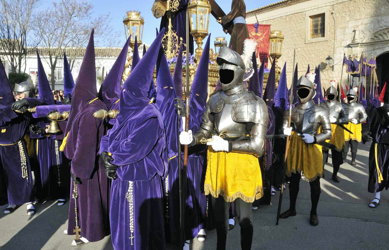 Armados de Ntro. Padre Jesús Nazareno de Ocaña (Toledo)